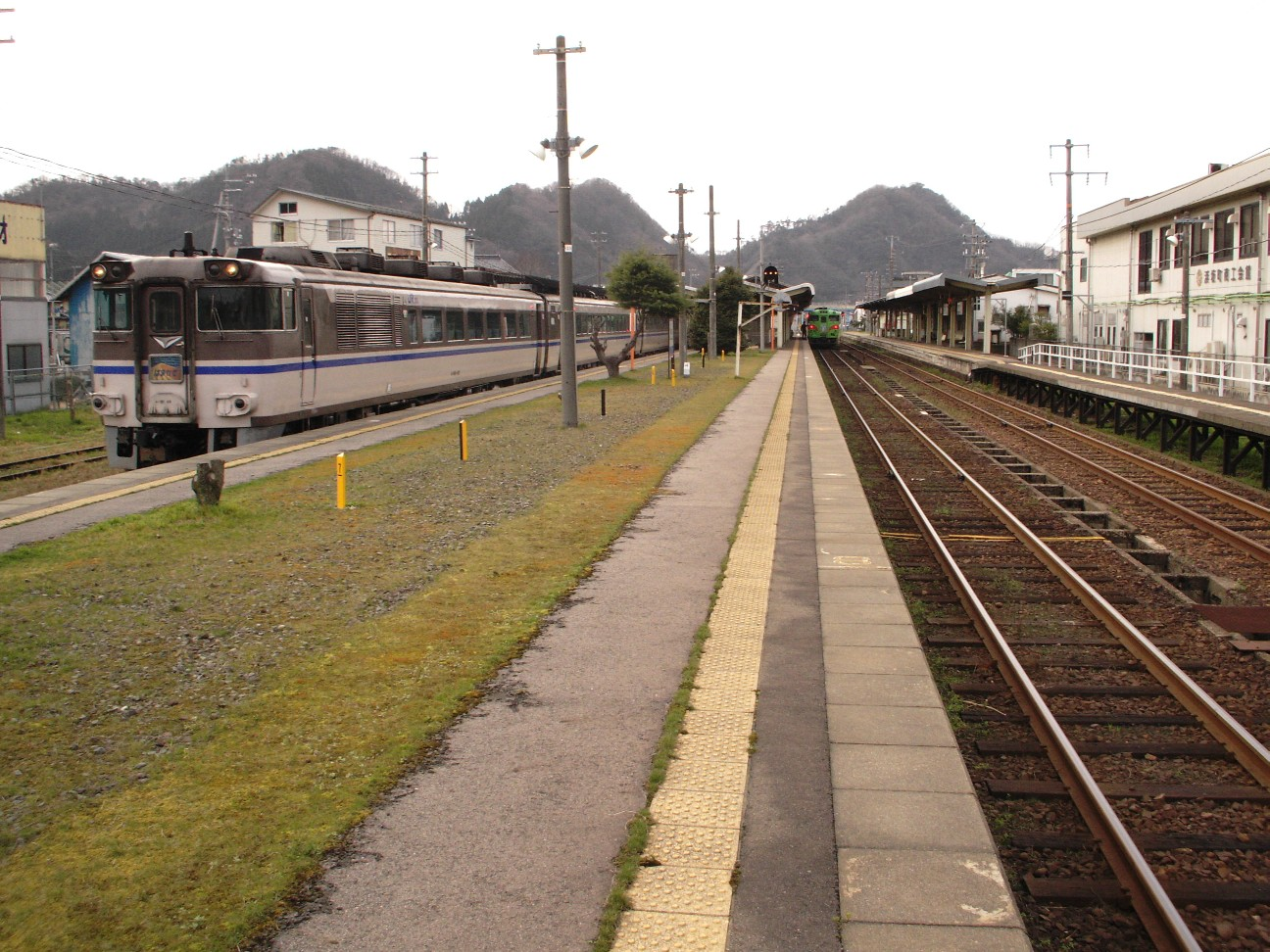 浜坂駅プラットホーム